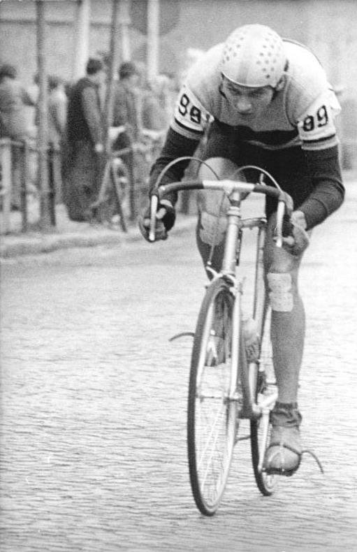 Bernd Drogan ADN-ZB Reiche 22.4.77-str Cottbus: Fünf-Etappen-Fahrt auf Friedensfahrtkurs. Der Cottbuser Friedensfahrtkanditat Bernd Drogan ist nach seinem Sieg bei der "Tour de Vauoluse" in Frankreich weiter gut in Schuß. Am 22.4.77 gewann er die zweite Etappe der Fünf-Etappen.Fahrt von Berlin nach Cottbus über 132 km in 2:58,33 st. In seiner Heimatstadt konnte er die DDR-Fahrer Karl-Dietrich Diers und Detlef Bönisch im Spurt einer 18-köpfigen Spitzengruppe bezwingen. Abgebildete Personen: Drogan, Bernd: Radrennfahrer, Friedensfahrtteilnehmer, DDR